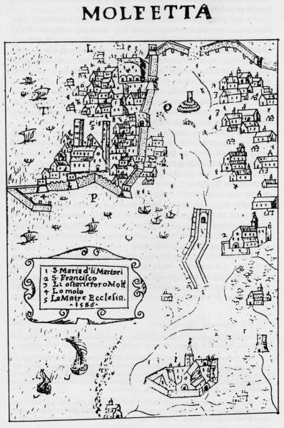 Molfetta nel 1500